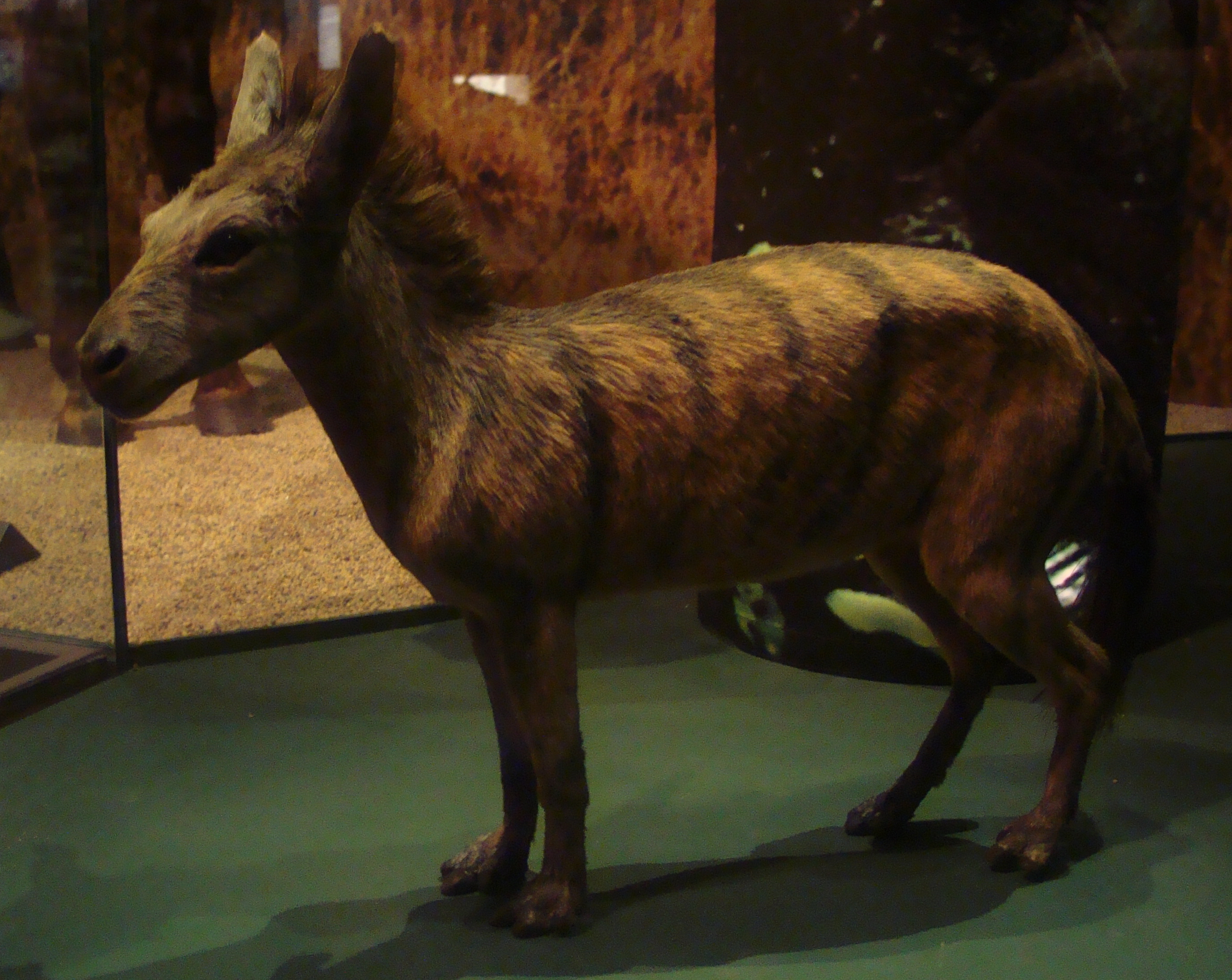 Sifrhippus sp. restoration in the Naturhistoriska Riksmuseet, Stockholm, Sweden.